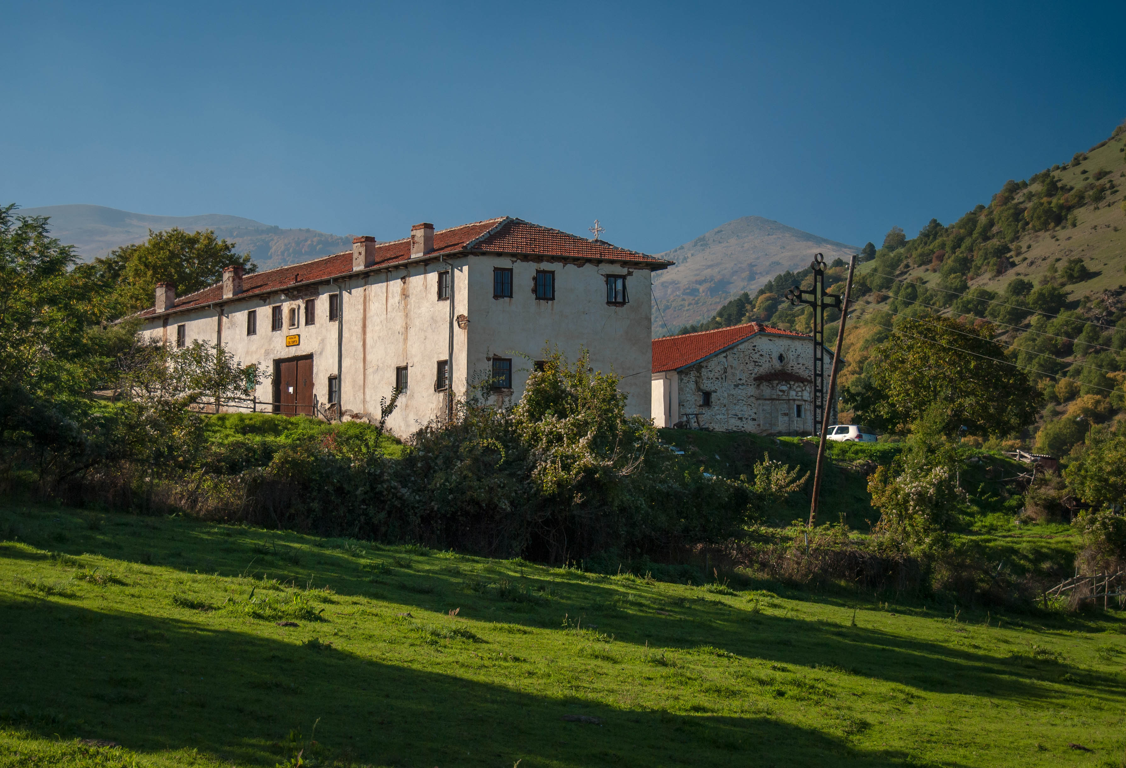 Црква „Св. Ѓорѓи“, главна манастирска црква на Велушки манастир